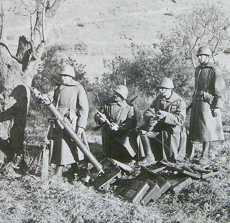 Mortaio da 81 Mod. 35 - bomba ghisa acciaiosa da esercitazione